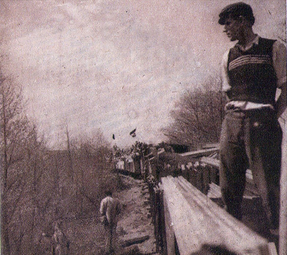 Der Bau der Bahnstrecke Banja Luka–Doboj war eine der letzten großen Eisenbahnbauten der jugoslawischen Jugendbrigaden. Die 93,5 km lange Strecke wurde vom 1. März bis 20. Dezember 1951 von mehr als 87 000 jungen Menschen gebaut, wobei 34 Brücken und drei Tunnels mit einer Länge von rund 4 Kilometern erstellt und ca. 2 Millionen Kubikmeter Erdmaterial verschoben wurden. Eine besondere Herausforderung war der Bau des Ljeskove-Vode-Tunnels, bei dem Wassereinbrüche und Einstürze die Arbeit behinderten.